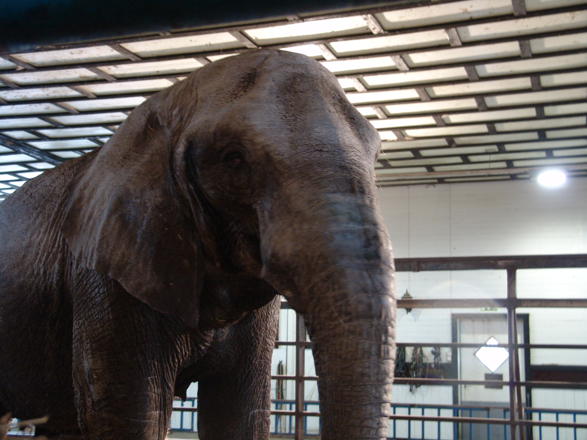 Zoolandia - зоологический парк в Лието. Слониха Ванни